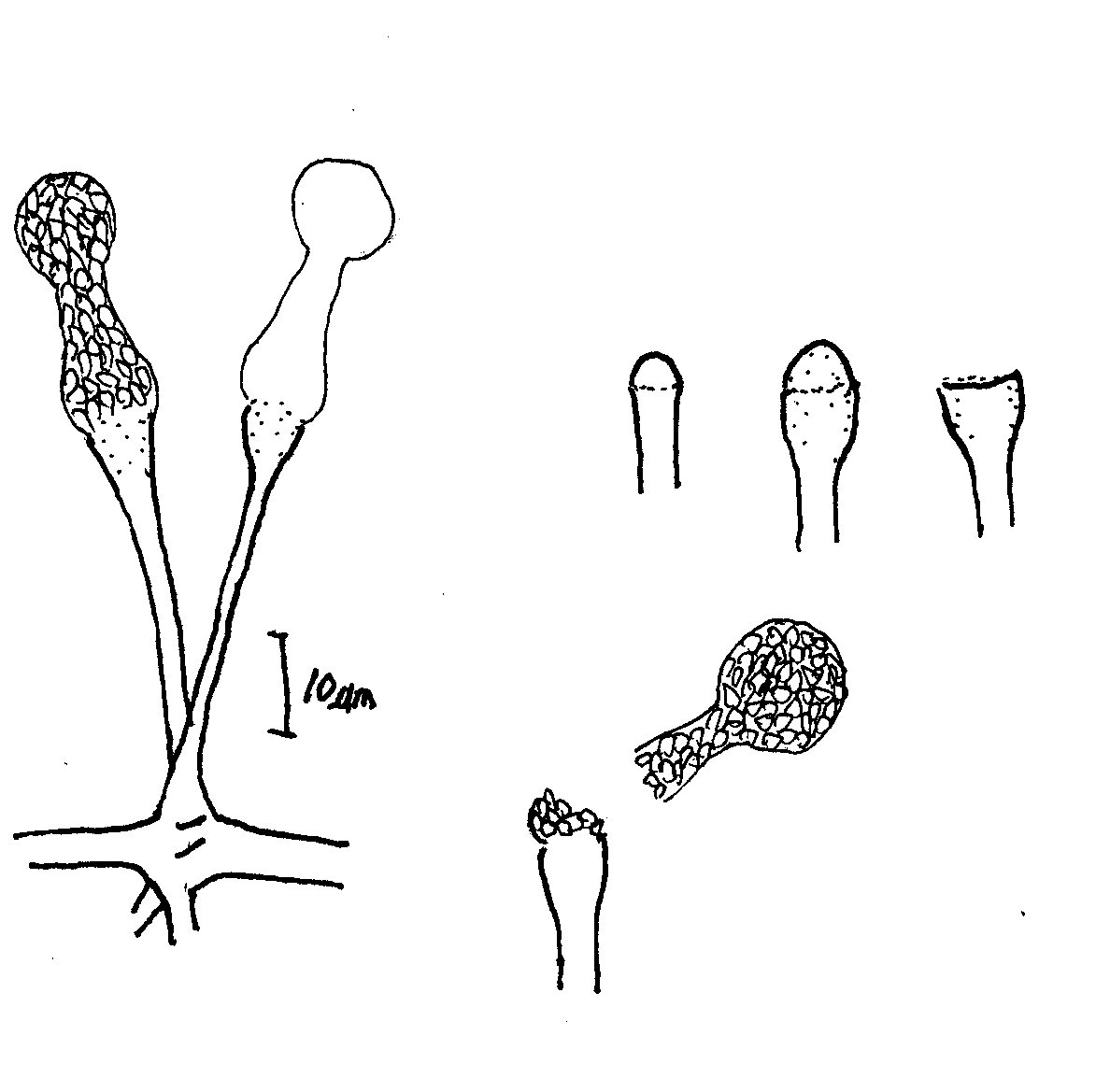 Shipton et Schipper(1975)より模写